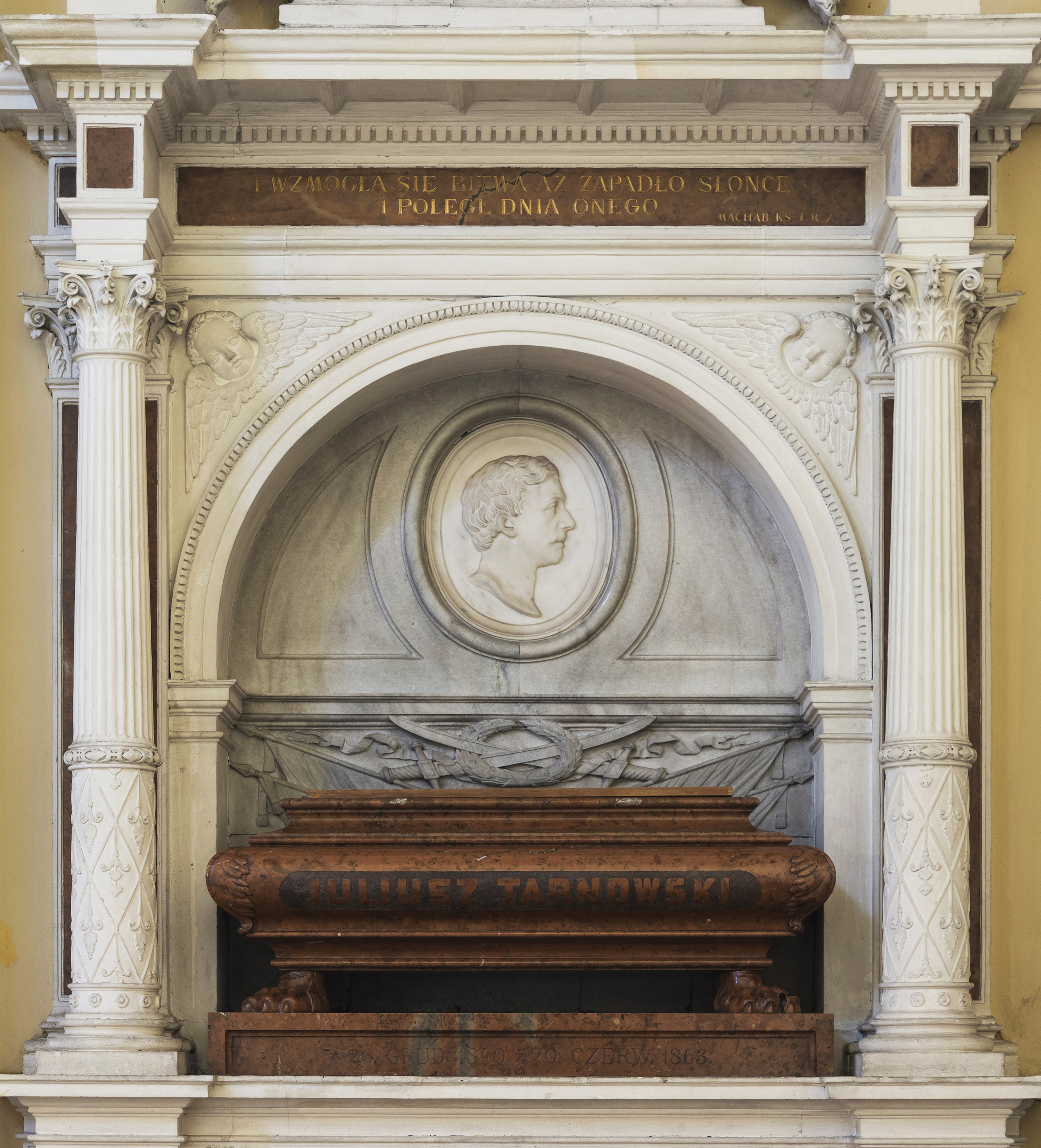 Tarnobrzeg, kościół p.w. Wniebowzięcia NMP, 1693-1707, 1904-1909